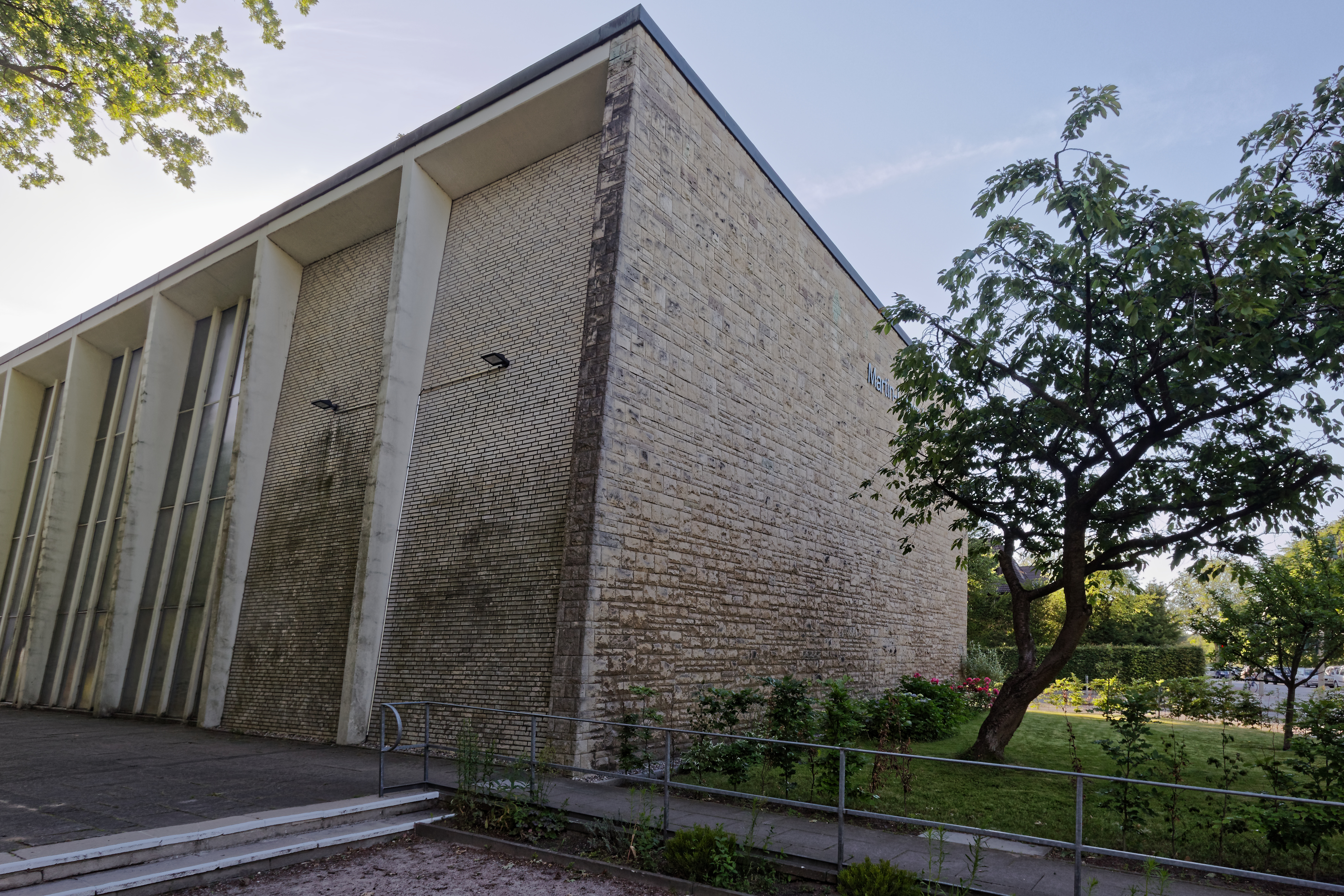 Hamburg-Alsterdorf, Martin-Luther-Kirche, KirchenschiffThis is a photograph of an architectural monument.